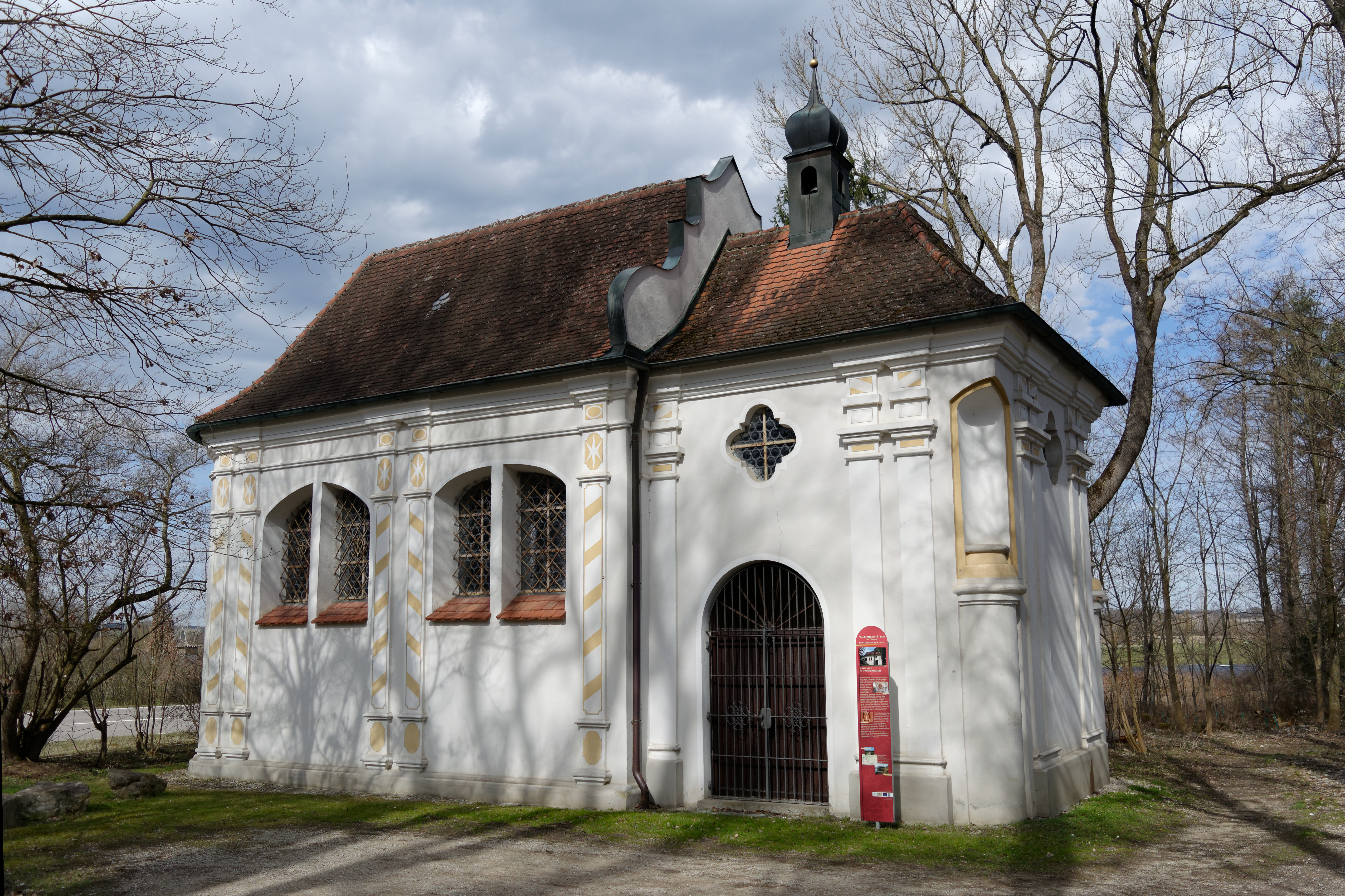 Wallfahrtskapelle Maria Aich bei Oberbernbach. Bayerische Denkmalliste Nr. D-7-71-113-76